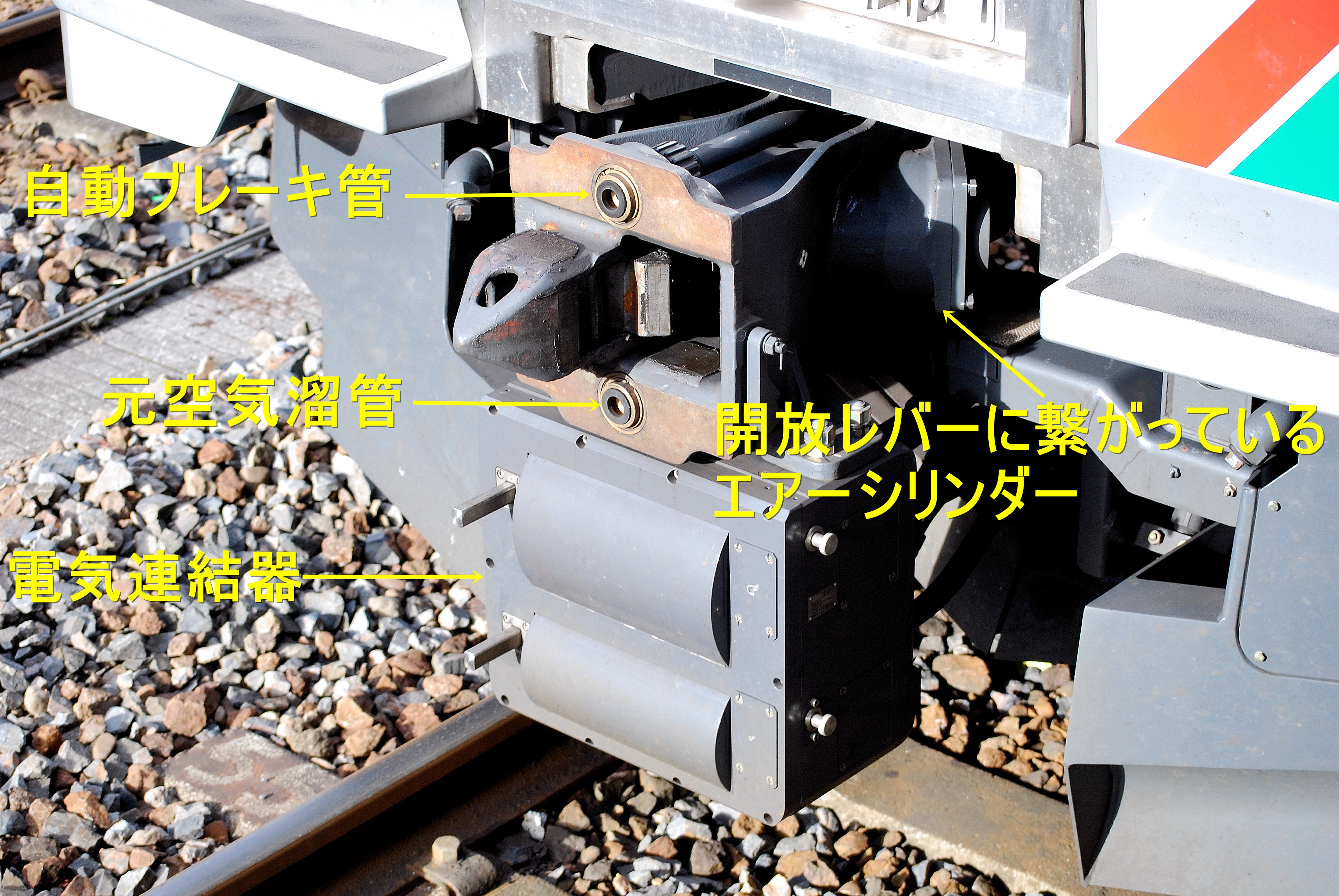 E721系電車の密着連結器とその周りの配管と機器類（ホームから撮影）